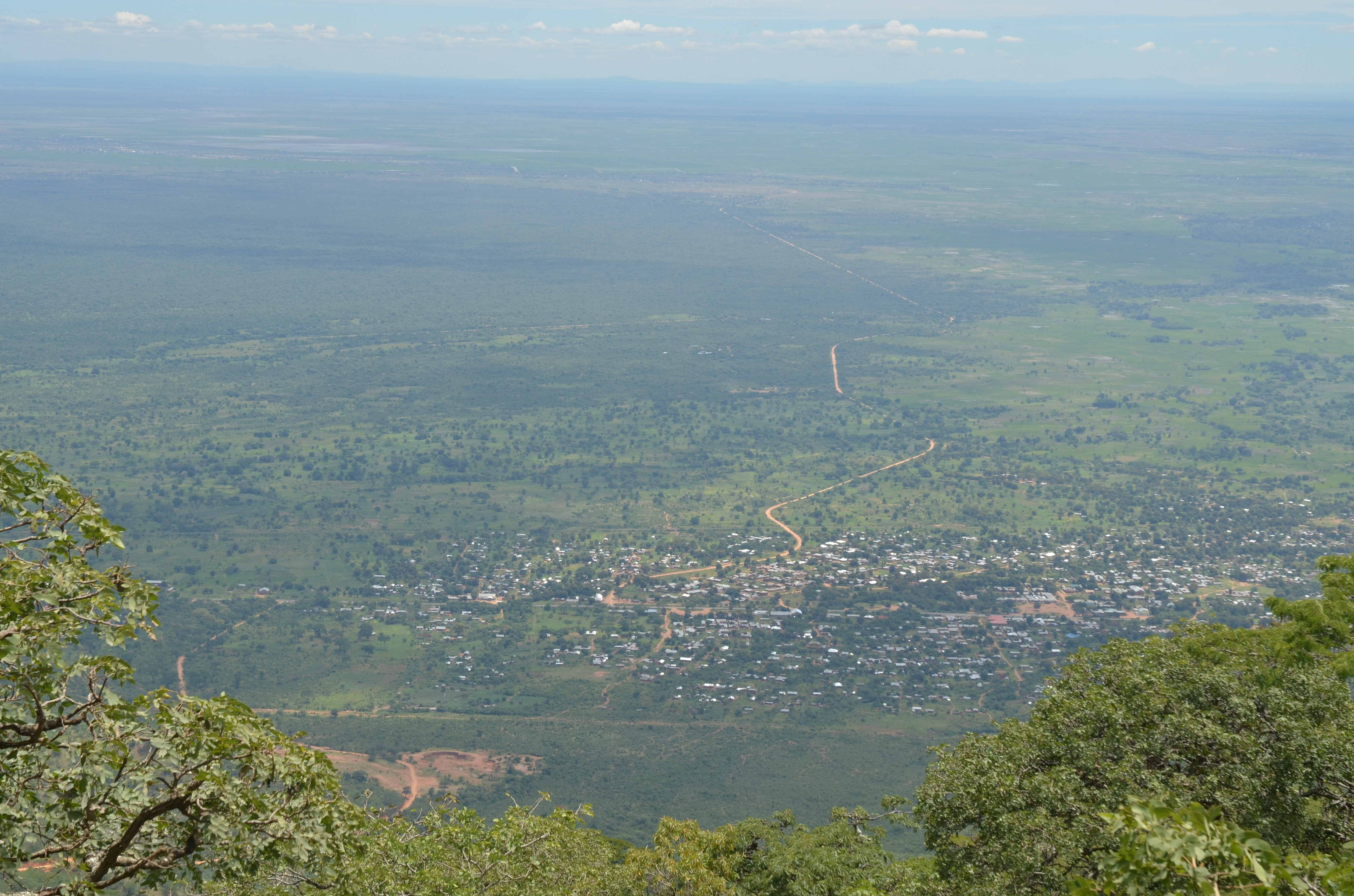 Die Ortschaft Chimala, Tansania, von der Schotterstraße nach Matamba (Kitulo Plateau) gesehen.